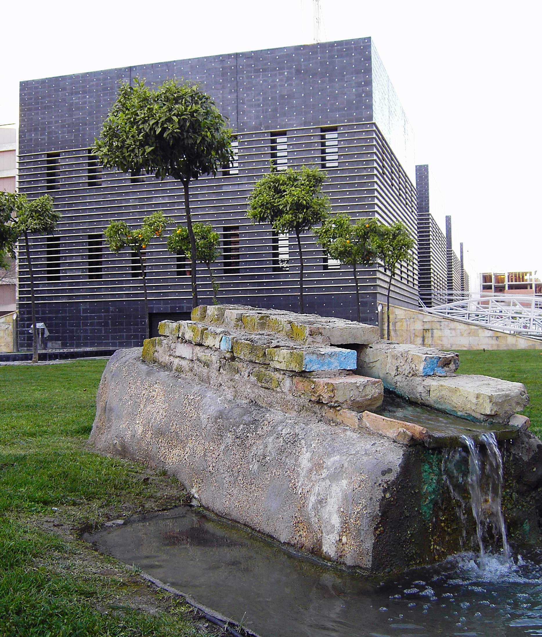 Fuente de la antigua ONVBA AESTUARIA de Huelva.